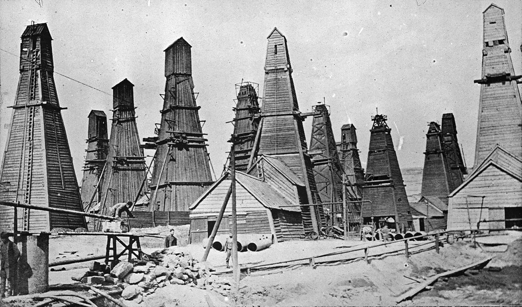 This work is in the public domain in its country of origin and other countries and areas where the copyright term is the author's life plus 70 years or less. You must also include a United States public domain tag to indicate why this work is in the public domain in the United States. Note that a few countries have copyright terms longer than 70 years: Mexico has 100 years, Jamaica has 95 years, Colombia has 80 years, and Guatemala and Samoa have 75 years. This image may not be in the public domain in these countries, which moreover do not implement the rule of the shorter term. Côte d'Ivoire has a general copyright term of 99 years and Honduras has 75 years, but they do implement the rule of the shorter term. Copyright may extend on works created by French who died for France in World War II (more information), Russians who served in the Eastern Front of World War II (known as the Great Patriotic War in Russia) and posthumously rehabilitated victims of Soviet repressions (more information). This file has been identified as being free of known restrictions under copyright law, including all related and neighboring rights.